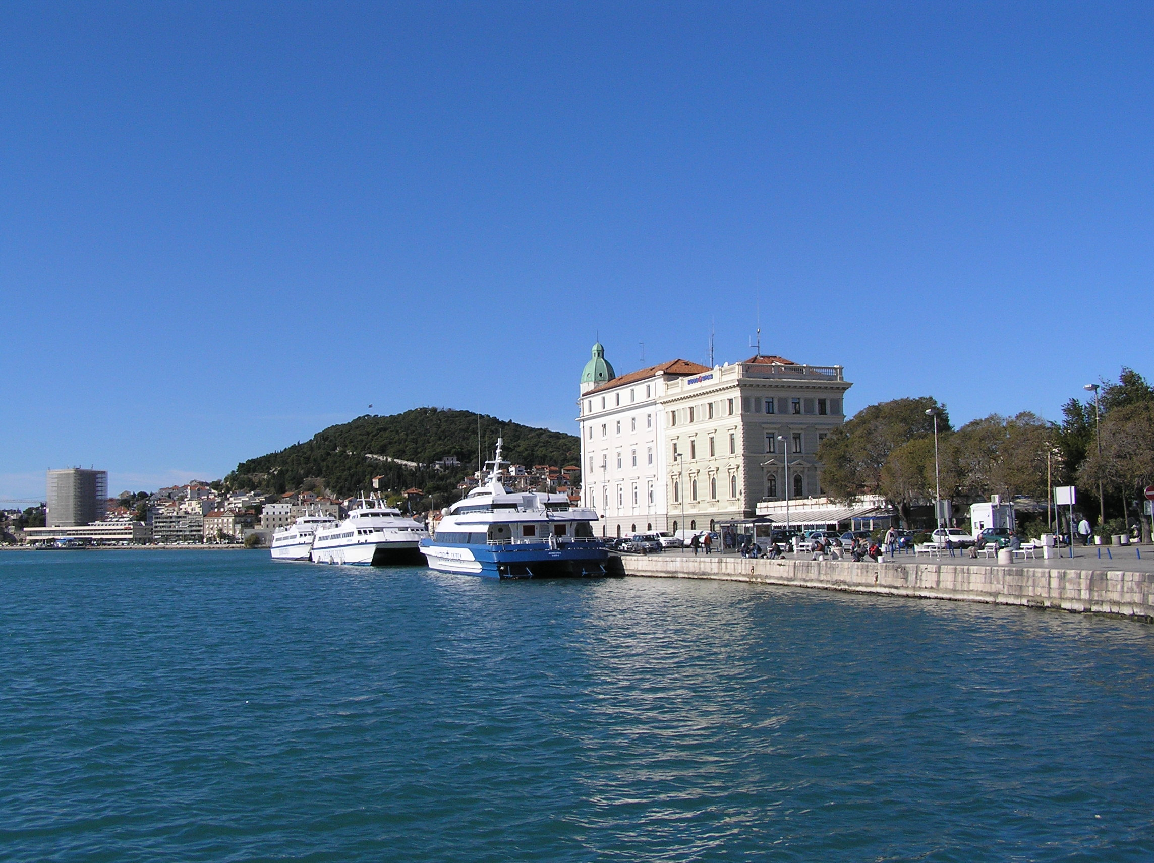 Split